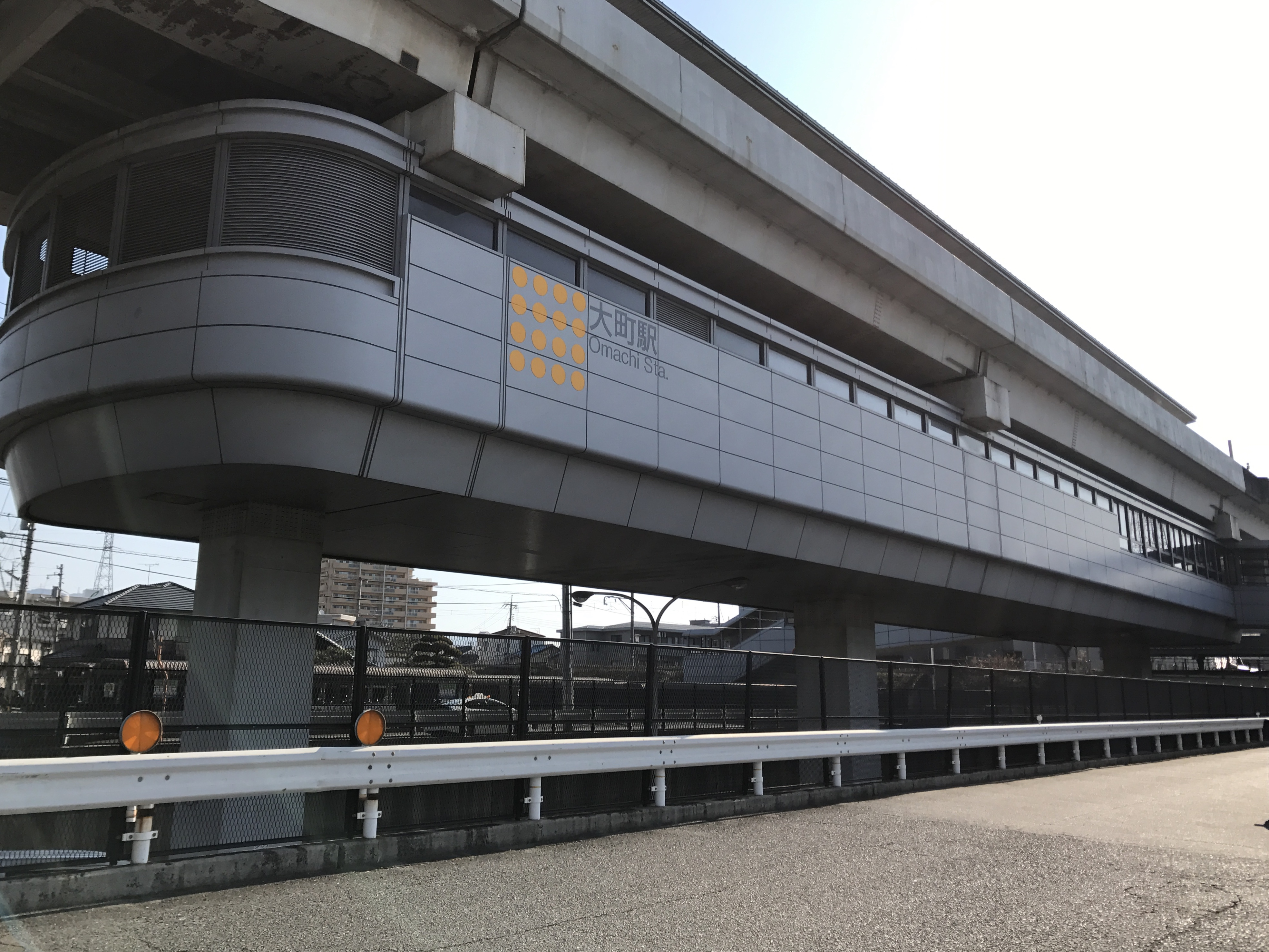 大町駅のアストラムライン駅舎